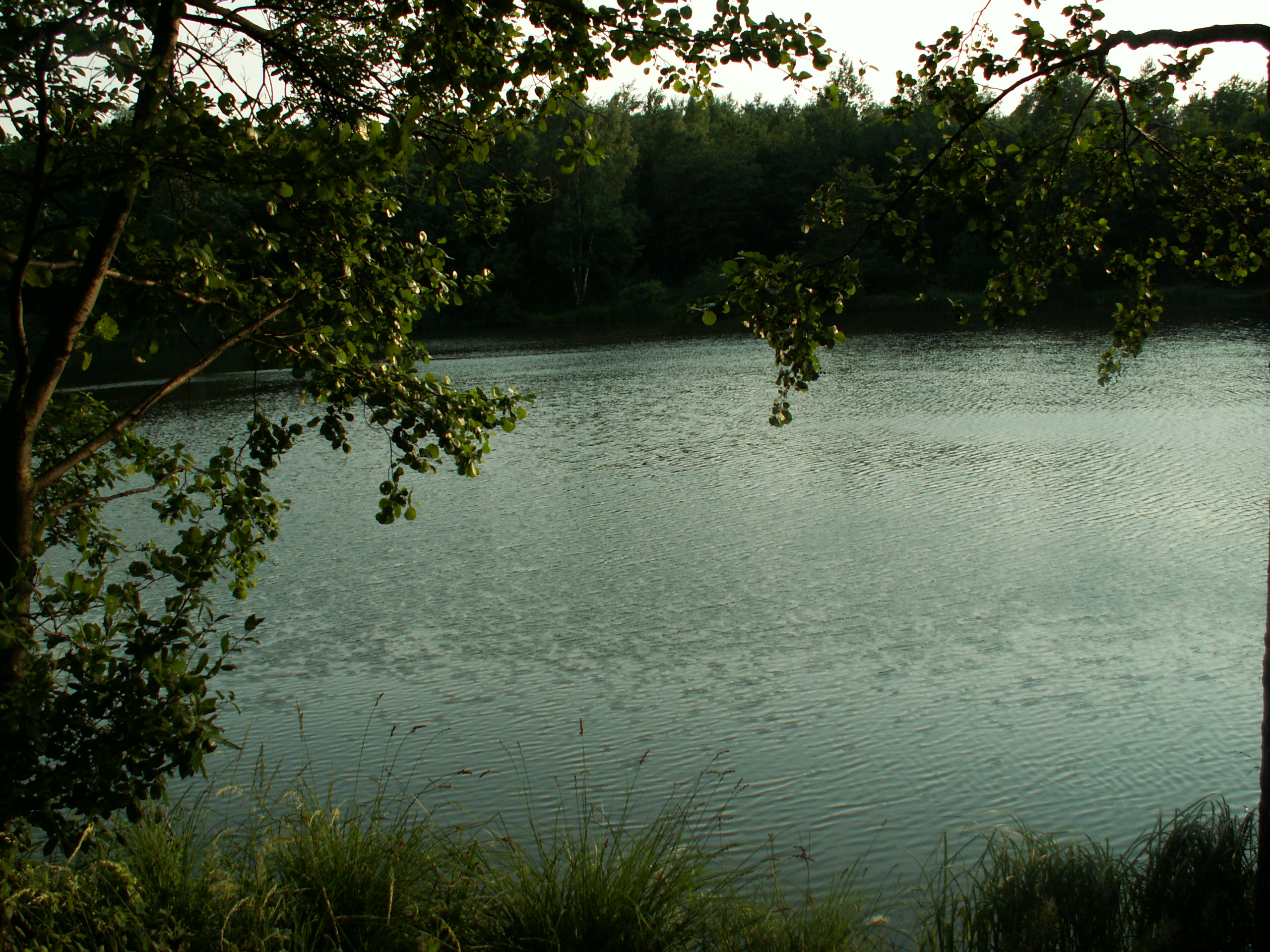 Dolina 3 stawów Katowice Muchowiec